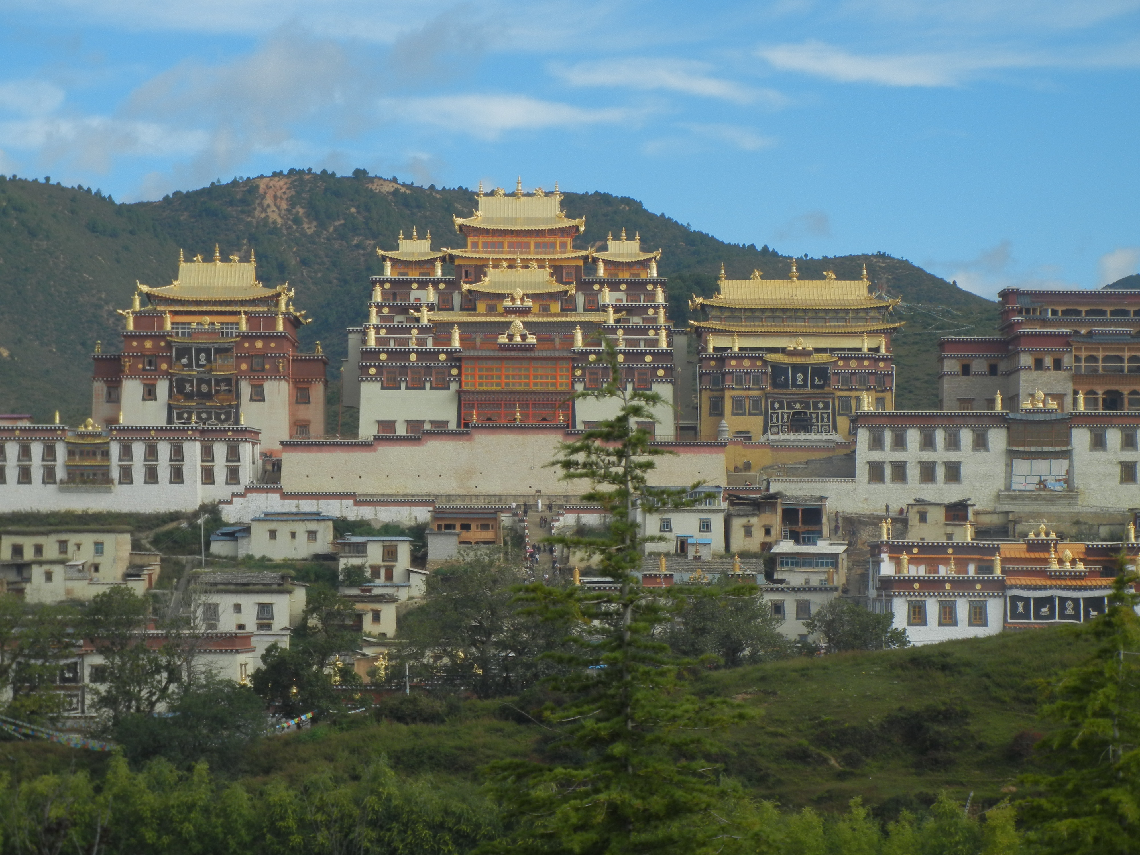 monastère de Songzanlin, Zhongdian/Gyalthang, Yunnan, Chine